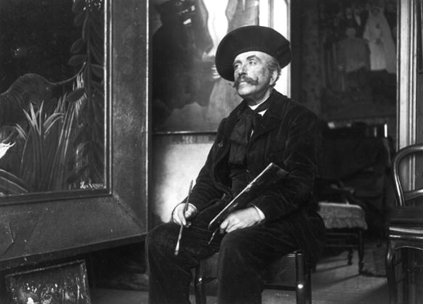 Rousseau dans son atelier rue Perrel.